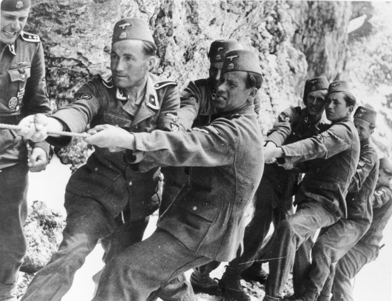 SS-PK Seidel 106/5 T 3219 Deutschland Mai 44 120 Meter Steg in 20 Minuten. Die Seilmannschaft beim Anziehen der Tragseile, die Pilone verstreben.